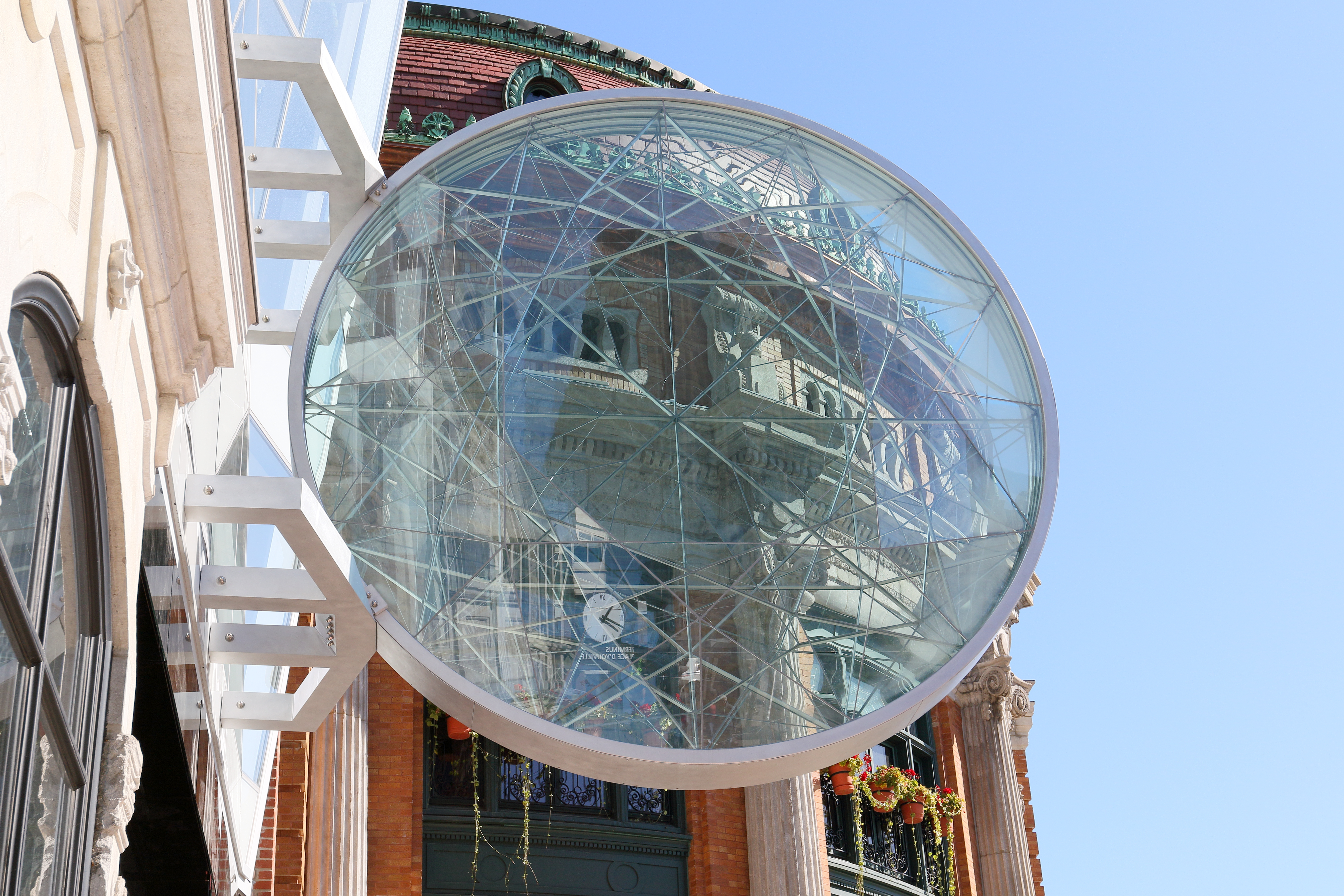 « Atome ou le fruit des étoiles » au Théâtre Le Diamant de Québec de l’artiste Claudie Gagnon.